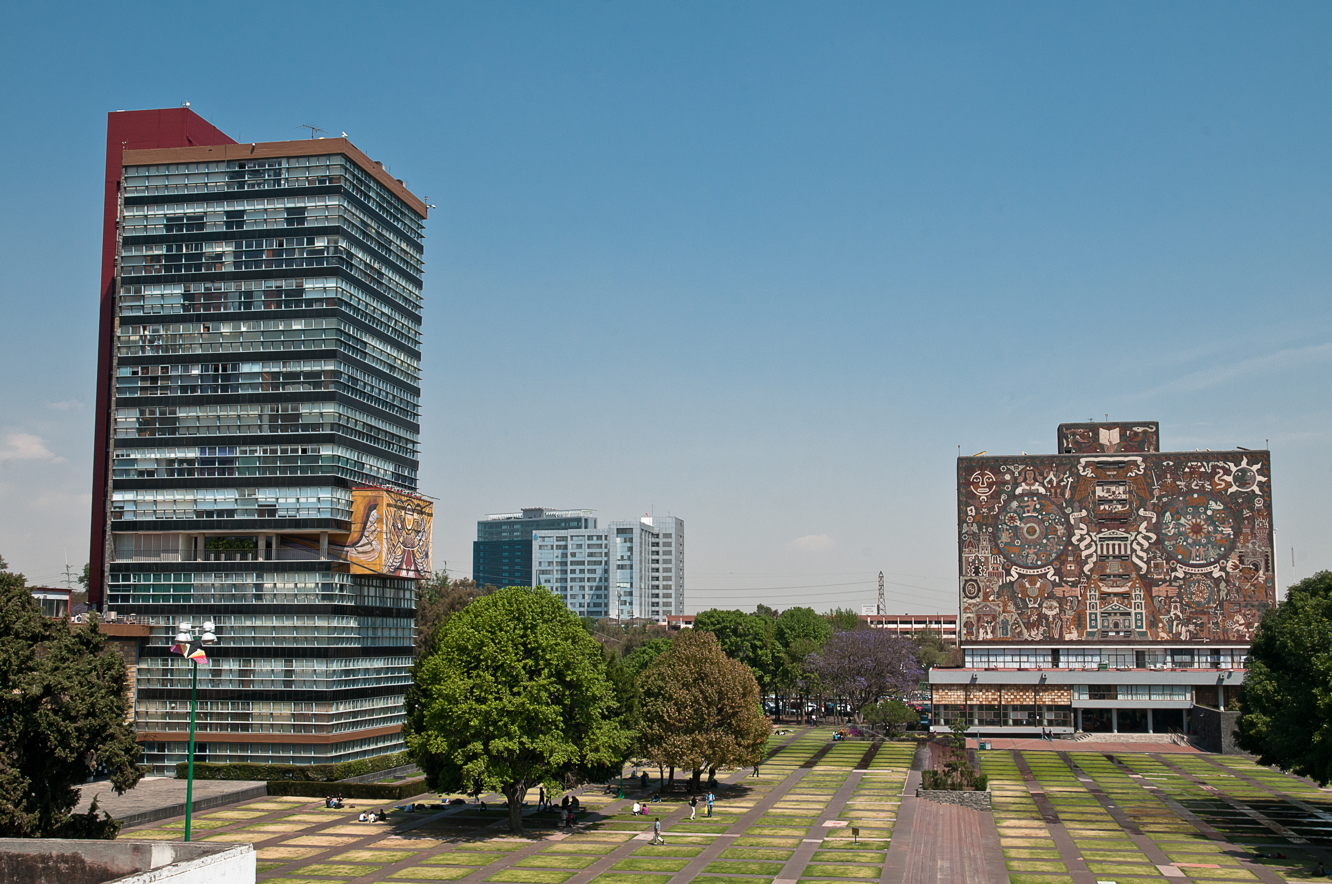 El otro día que la regué al tomar una foto me puse a buscar cómo podía mejorar la nitidez de la fotografía sin echar a perder mis pixeles (de forma muy perceptible). Encontré una forma de hacerlo muy sencilla usando el filtro "High Pass" de Photoshop y se me ocurrió que sería buena idea compartir ese conocimiento. Así que me puse a trabajar en un tutorial que saqué en el blog de Sarihuella: Está bueno y sí hace un paro. No es mágico, no enfoca donde no hay foco, pero sí ayuda a "dar el gatazo".